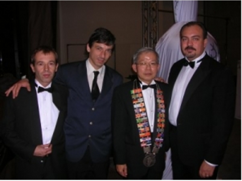 Mundial de coctelería Finlandia 2005 (Izq. der. Claudio Gambetta participante clásico, Diego Mato Presidente, Derrick Lee Presidente IBA, Jorge Soratti Delegado)